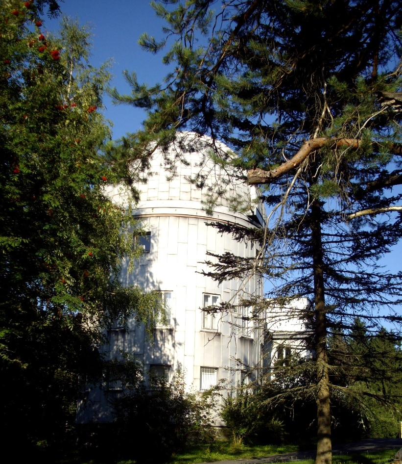 Sternwarte